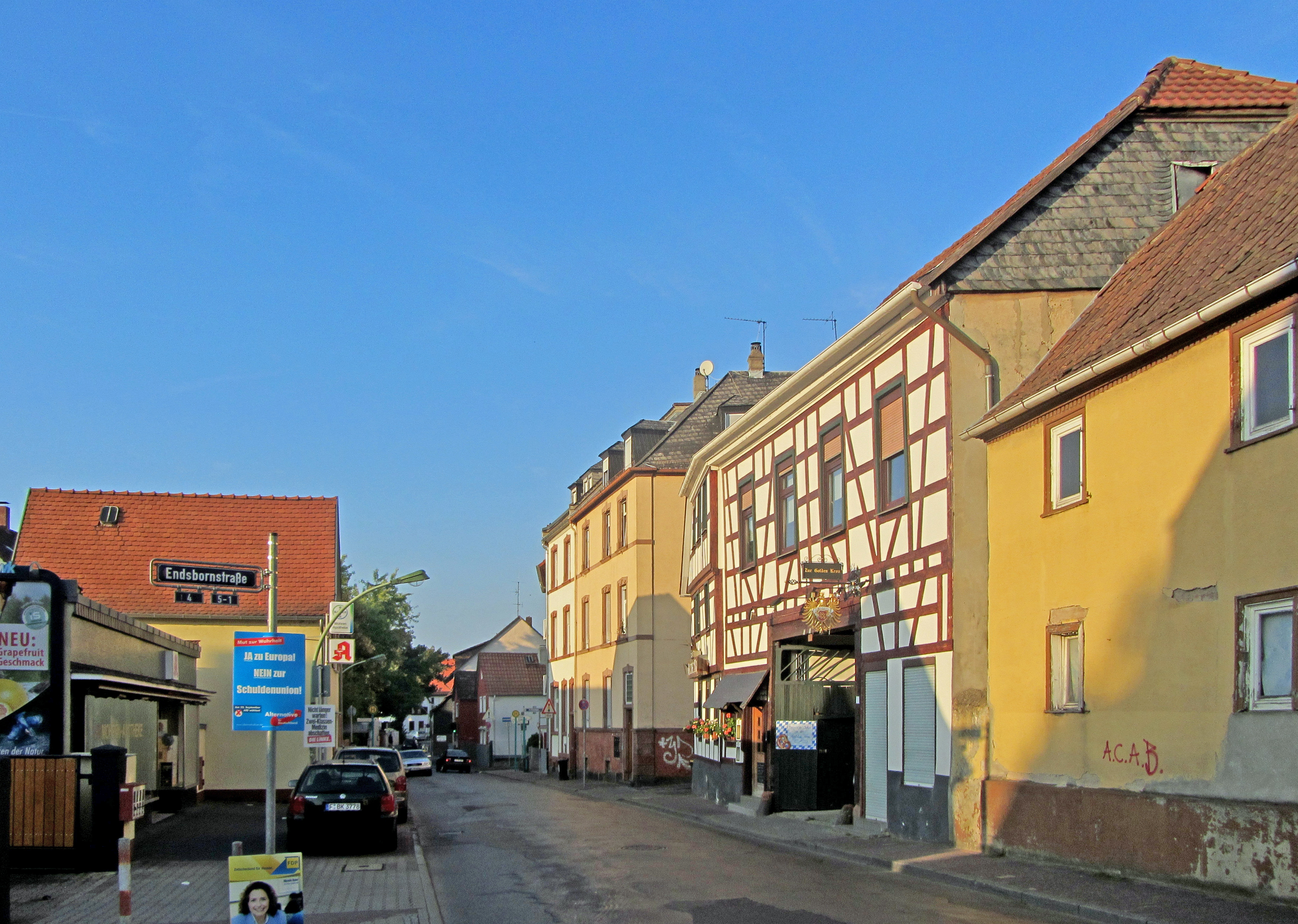 Die Straße "Alt-Eschersheim" in Ffm-Eschersheim